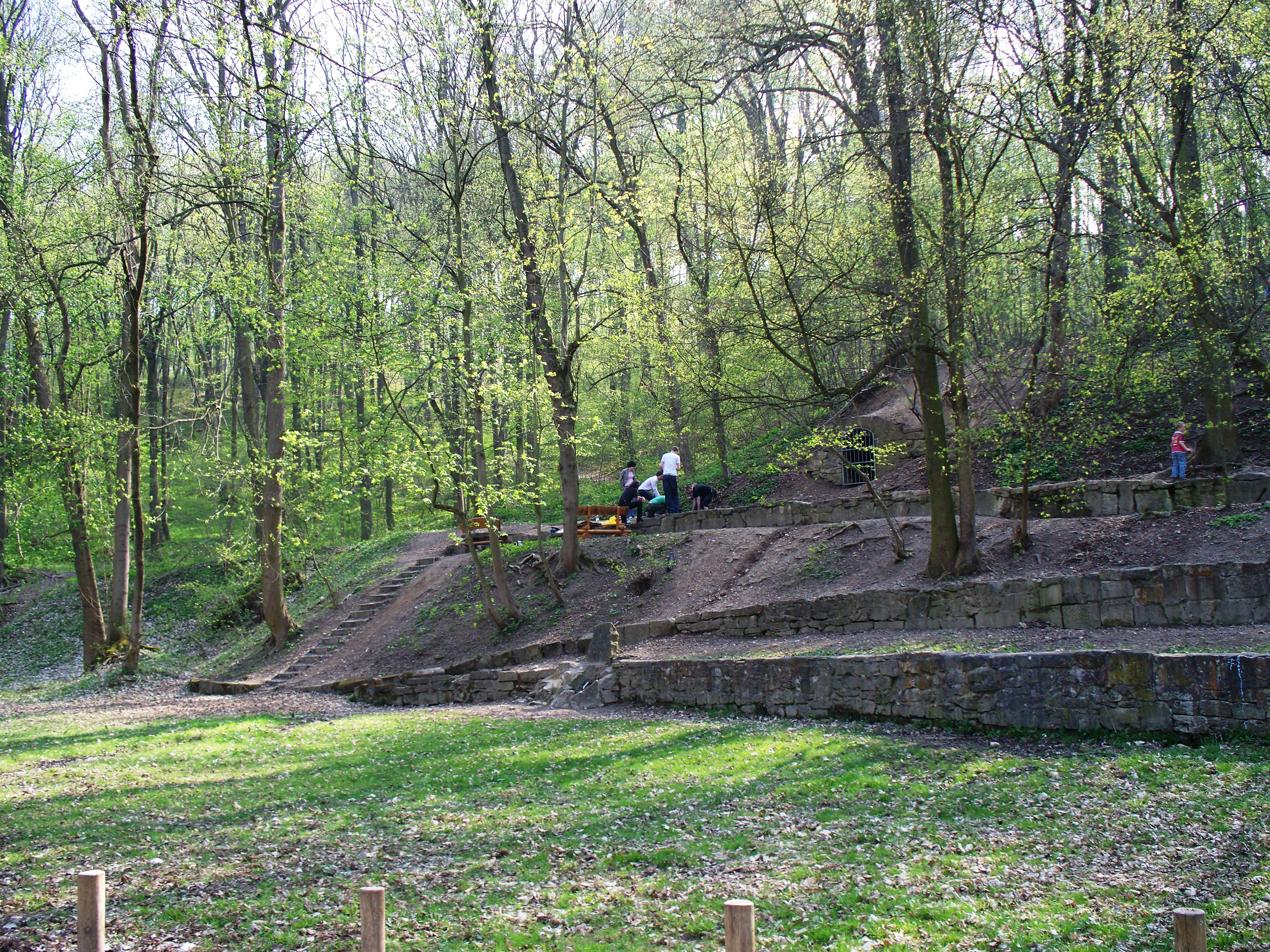 "Sängerplatz"